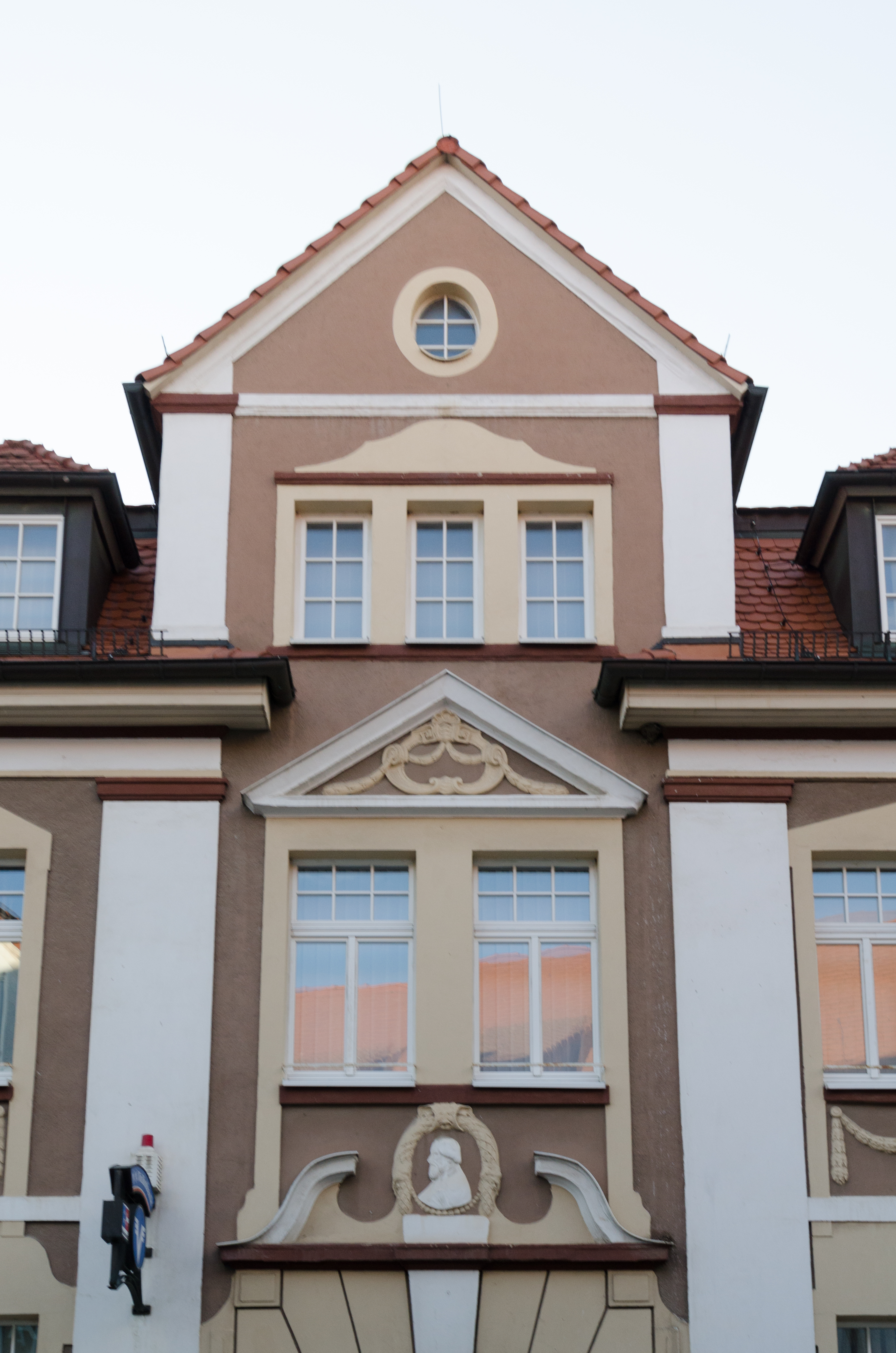 Querfurt, Klosterstraße 9